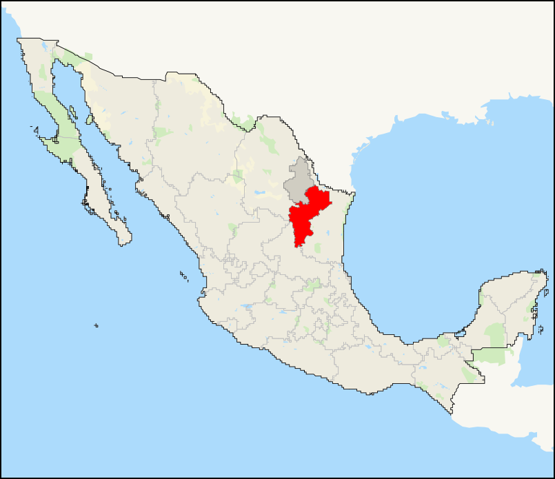 Mapa del distrito electoral federal 9 de Nuevo León ubicado en México